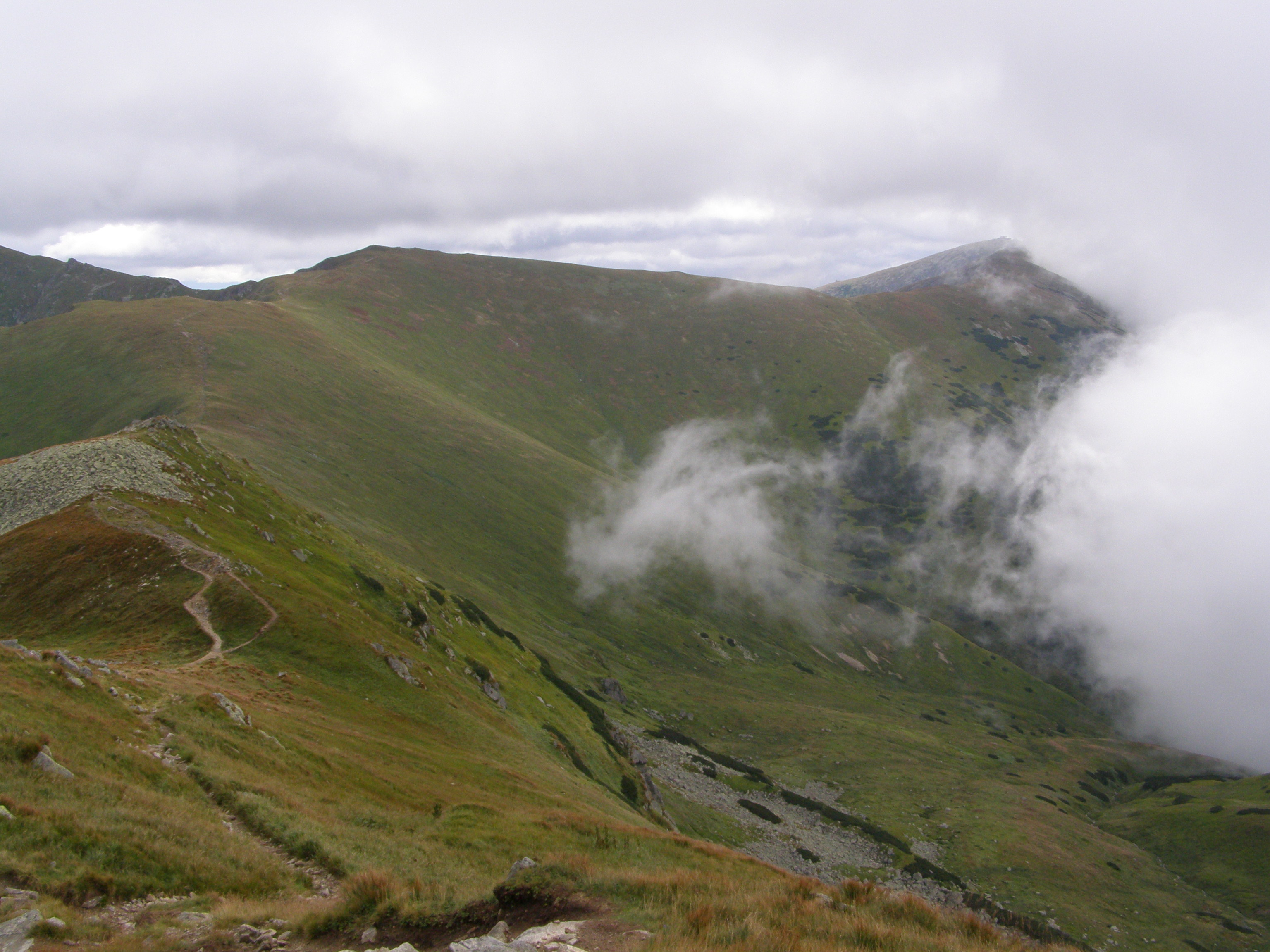 Nízké Tatry, Ďumbierské Tatry, západní strana vrcholu Poľana, pohled z úbočí vrcholu Kotliská (1937 m)